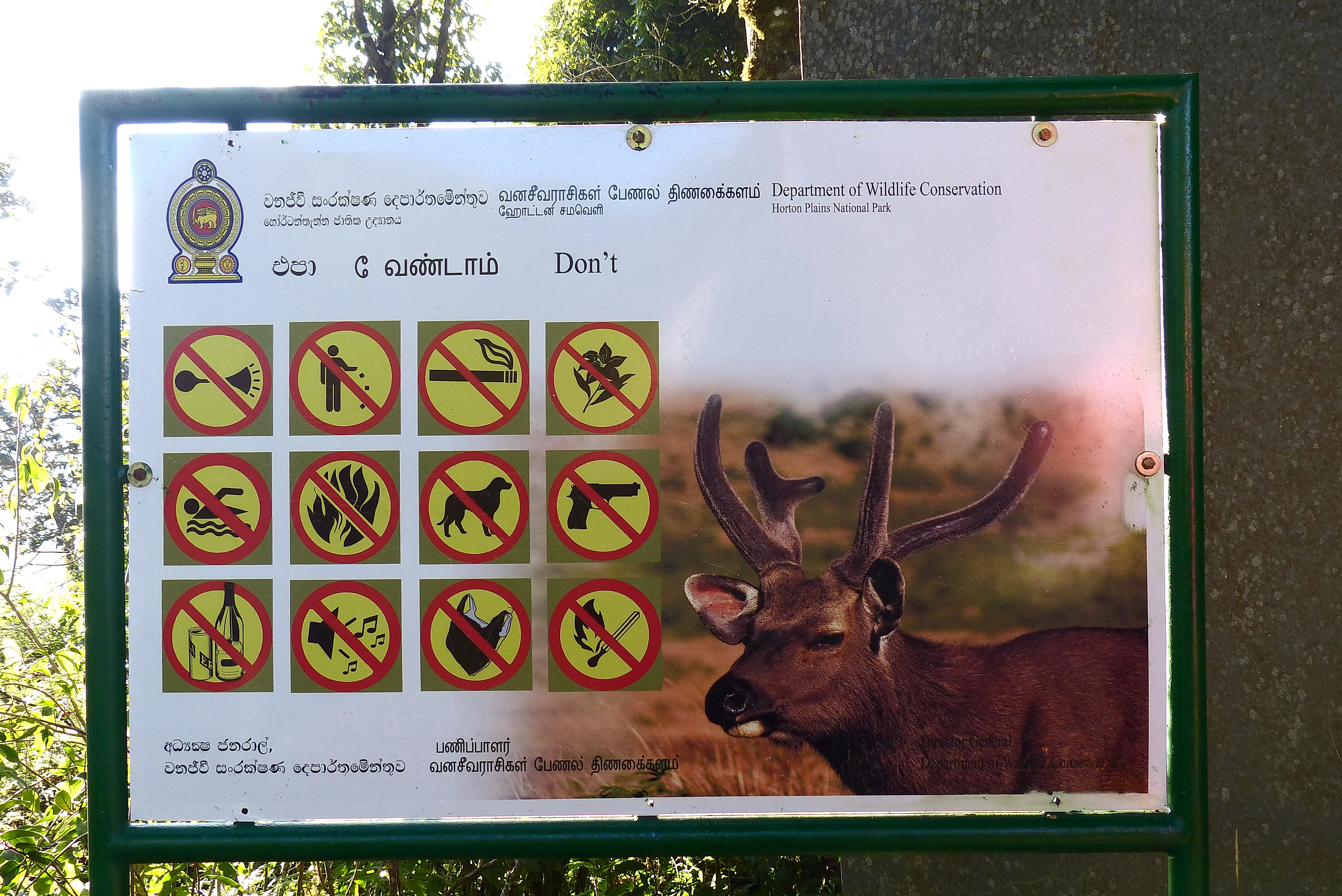 Verbotsschild am Eingang des Nationalparks Horton Plains auf Sri Lanka